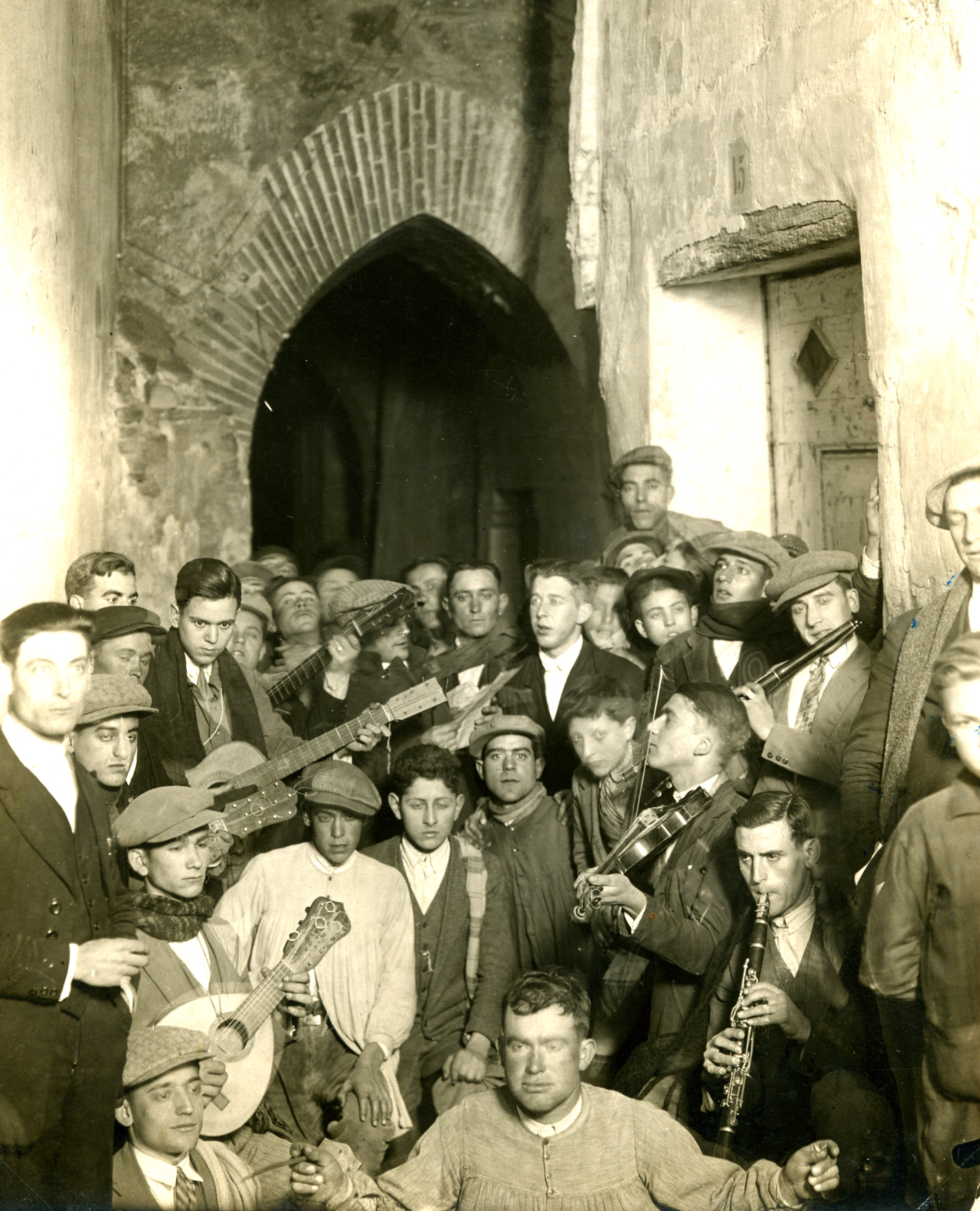 Rondalla de Mayos (circa 1925) - La Villa De Requena (Casc antic), Arc medieval del carreró de Paniagua.